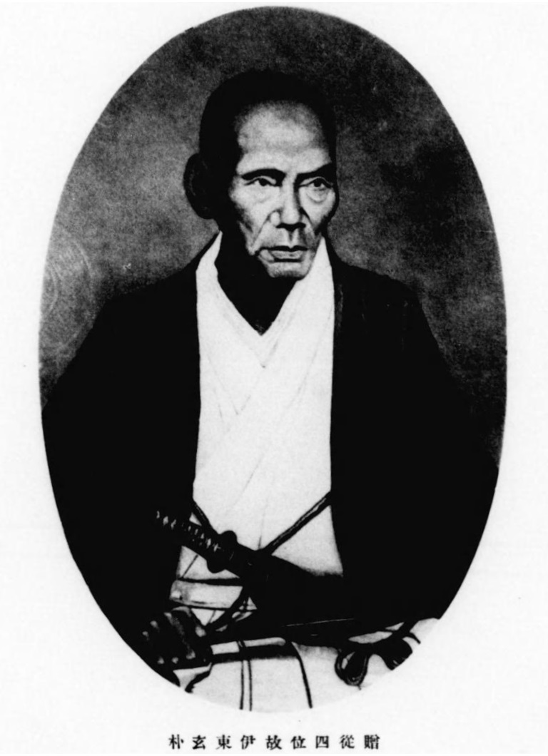 贈従四位故伊東玄朴